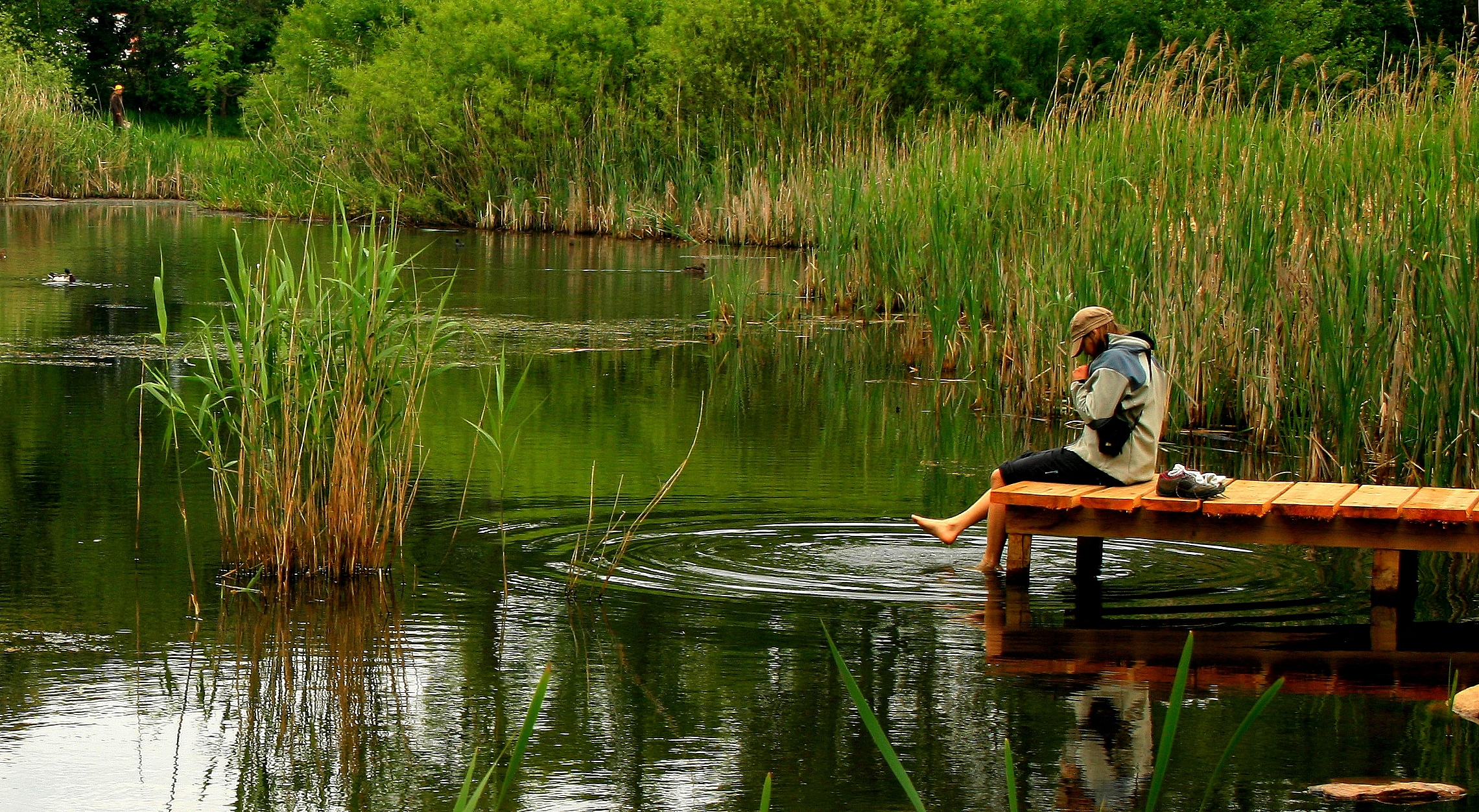 Mokřady Jablonné jsou místem pro lidi i pro přírodu, přesně dle motta Čmeláka.